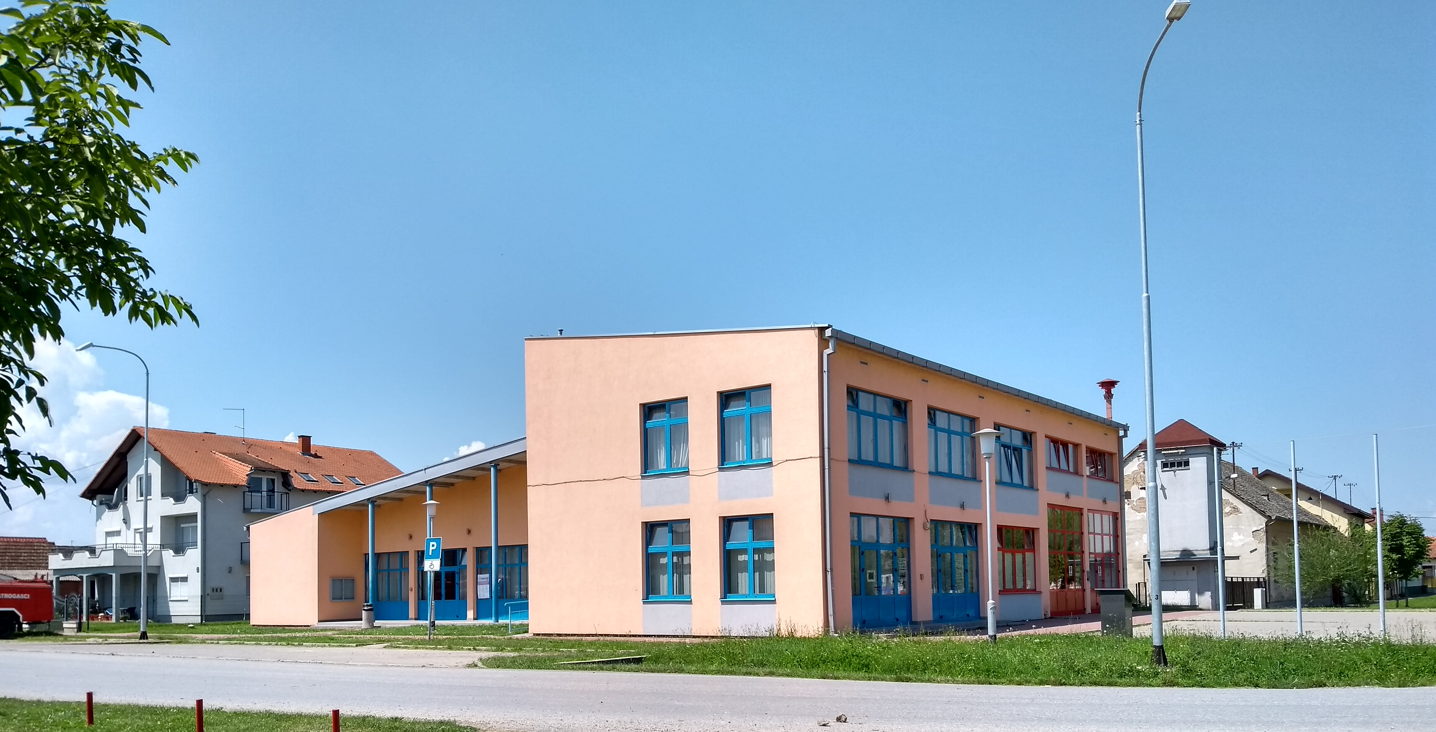 Društveni dom u Budrovcima1